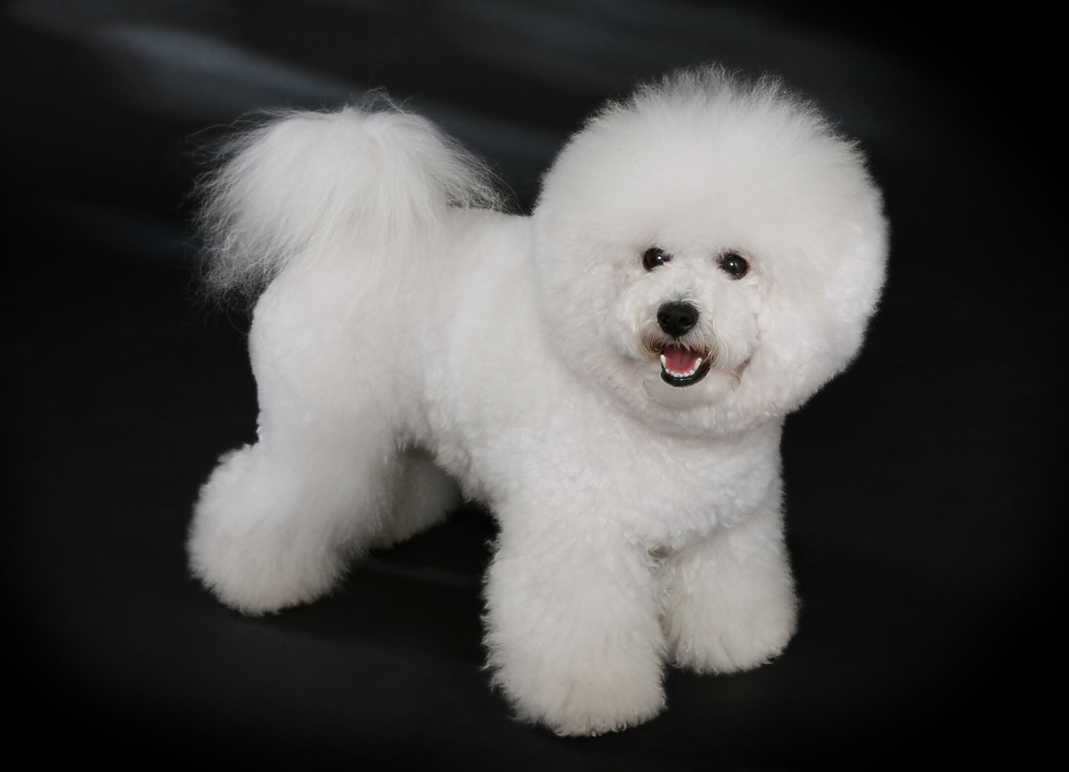 reinrassiger Bichon Frisé